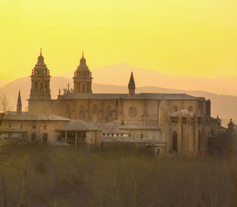 Catedral de Pamplona